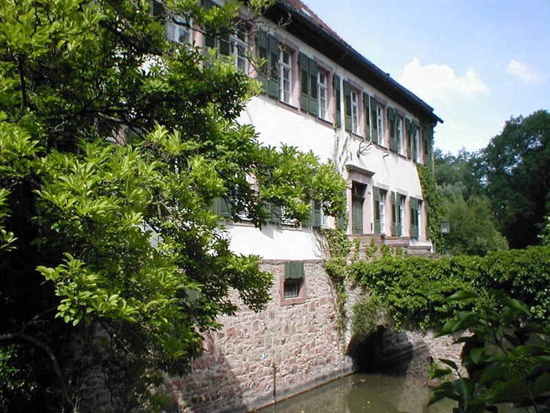 Wasserschloss Schwarzach, erbaut auf den Fundamenten der Burg Schwarzach, Schwarzach (Odenwald)